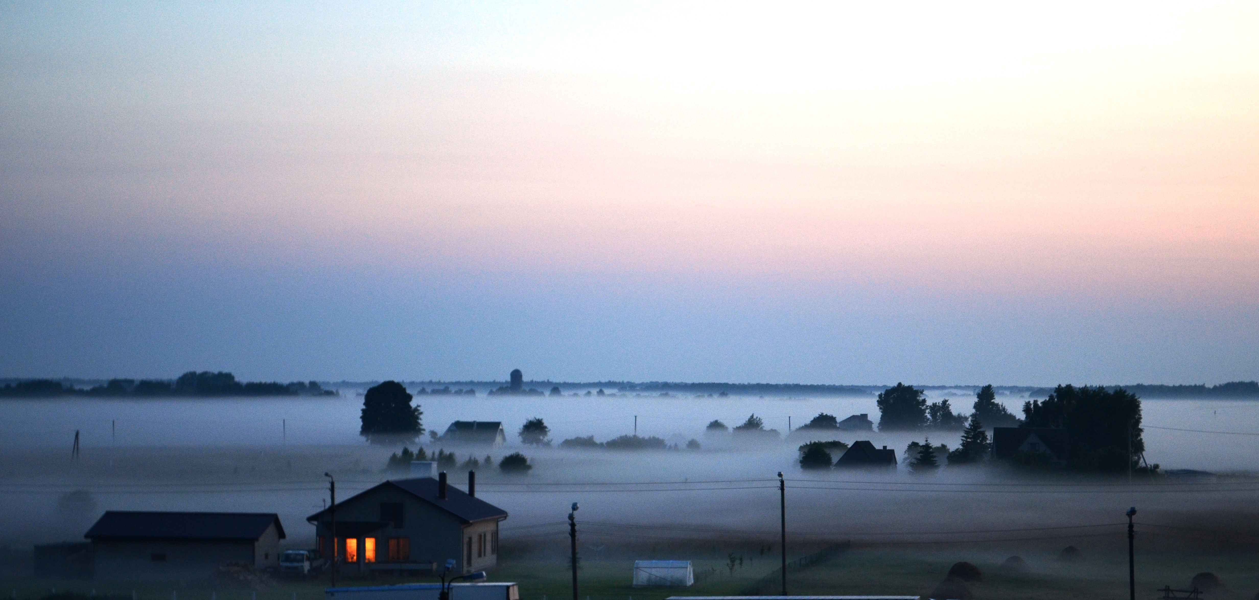 Varėnai, Kėdainių raj.